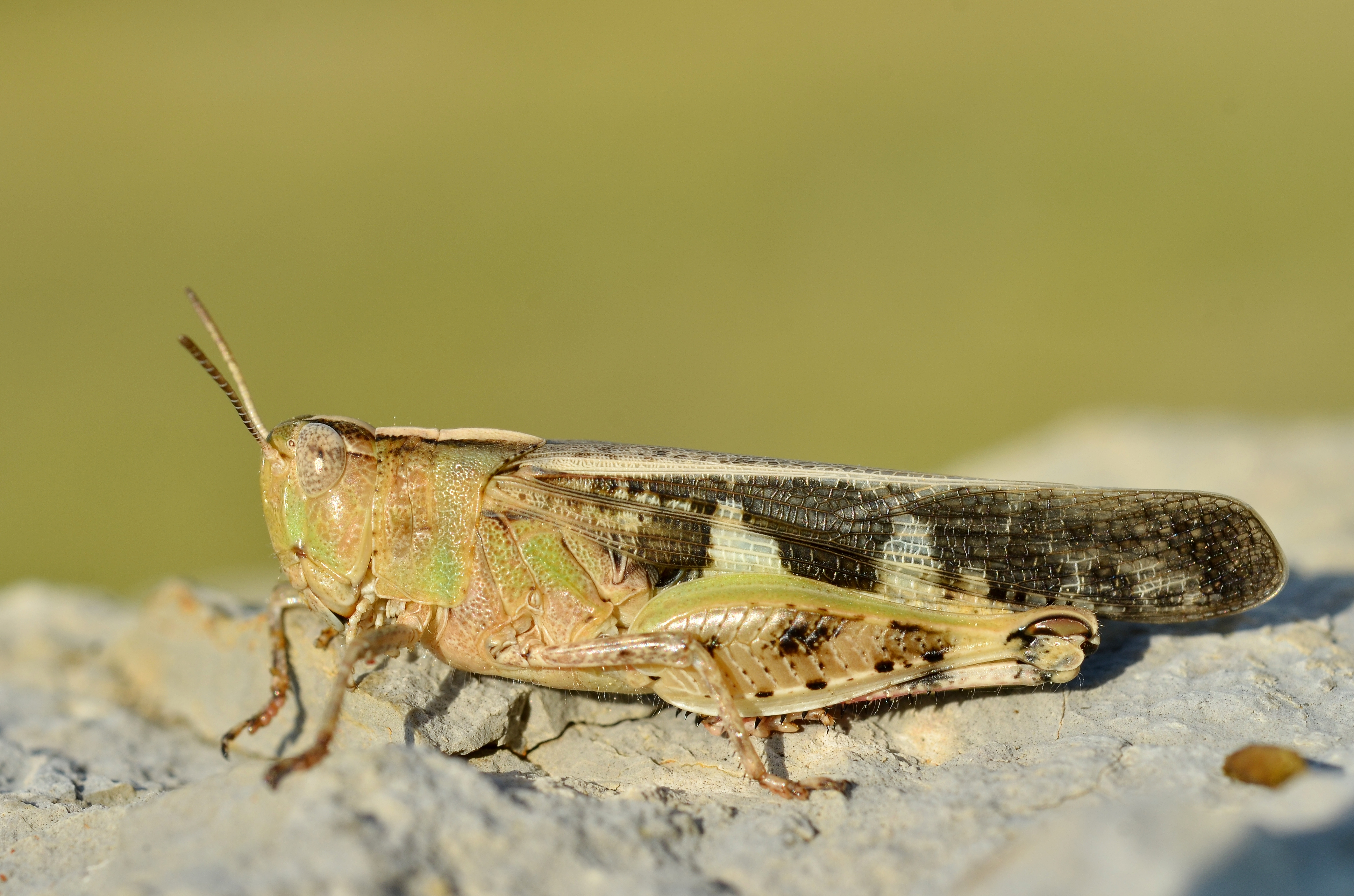 Aiolopus strepens female